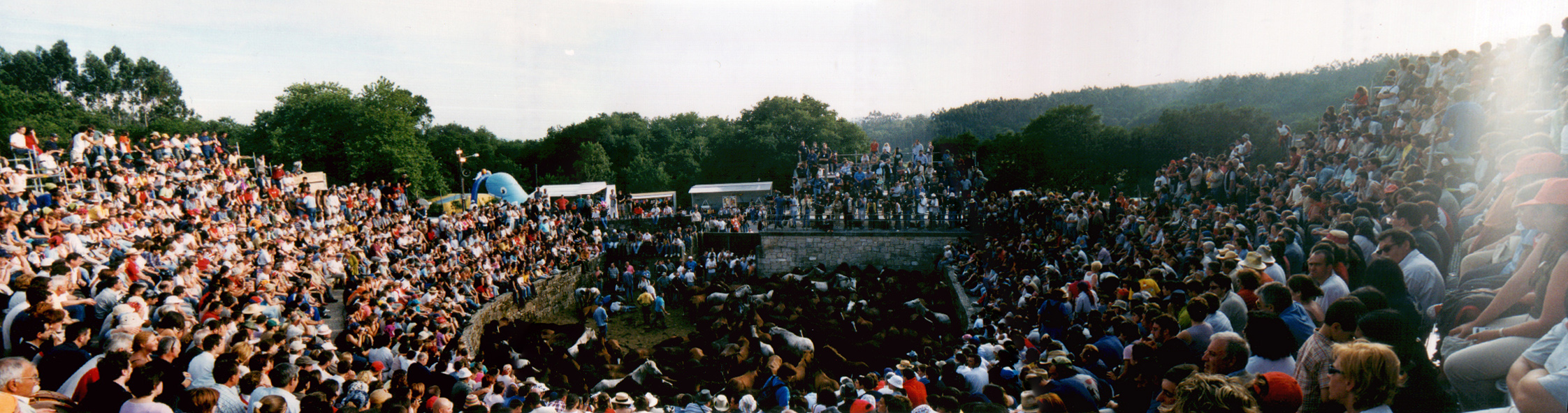 Sabucedo curro panoramica